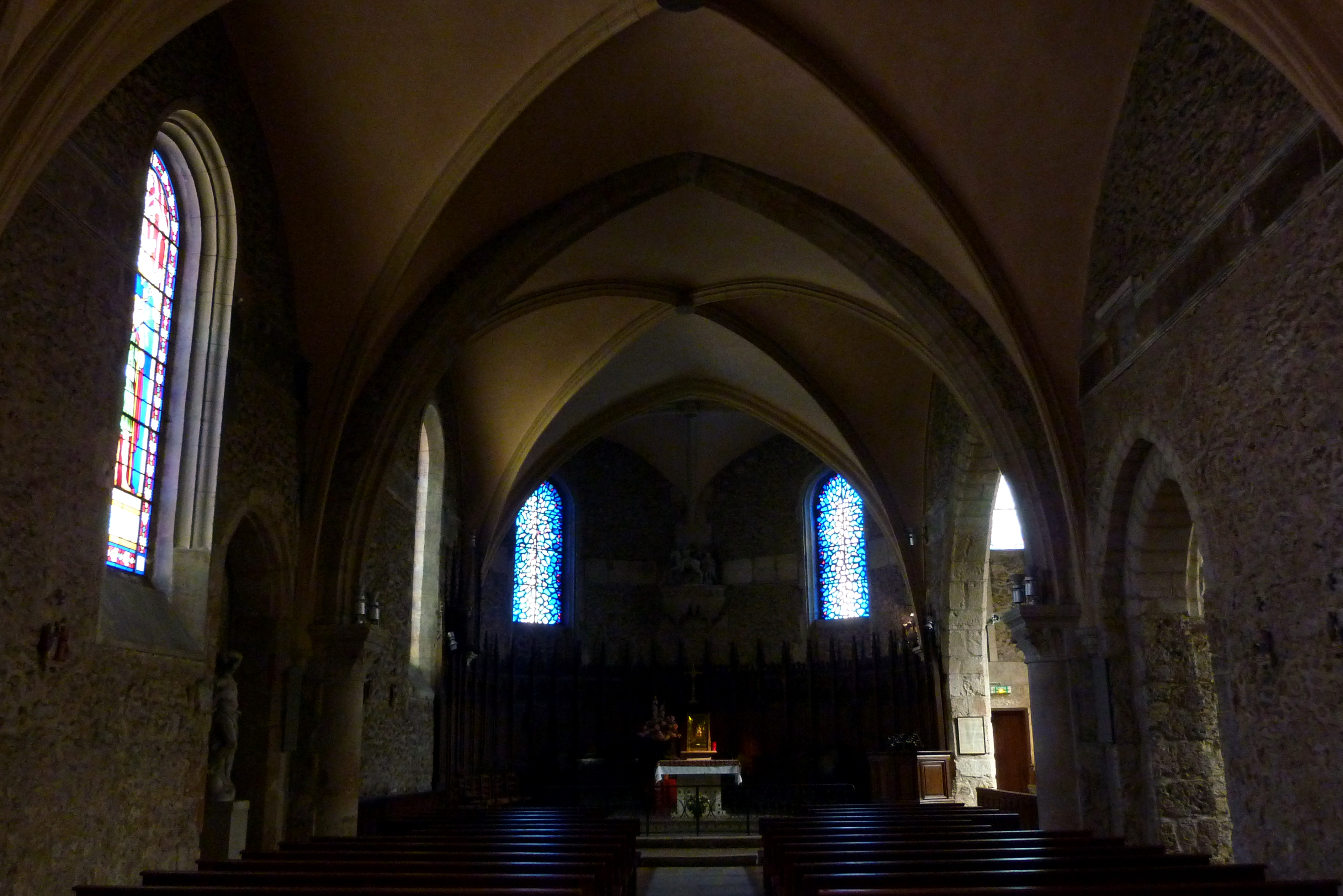 Katholische Pfarrkirche Saint-Martin in Jouy-en-Josas im Département Yvelines in der Region Île-de-France (Frankreich), Innenraum